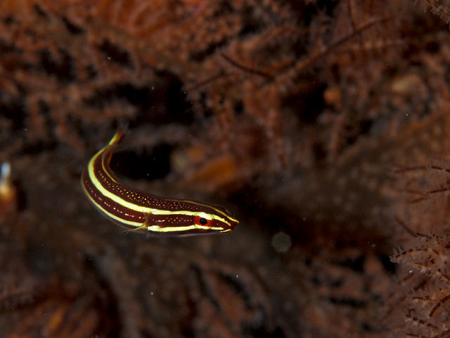 タスジウミシダウバウオ Discotrema lineata